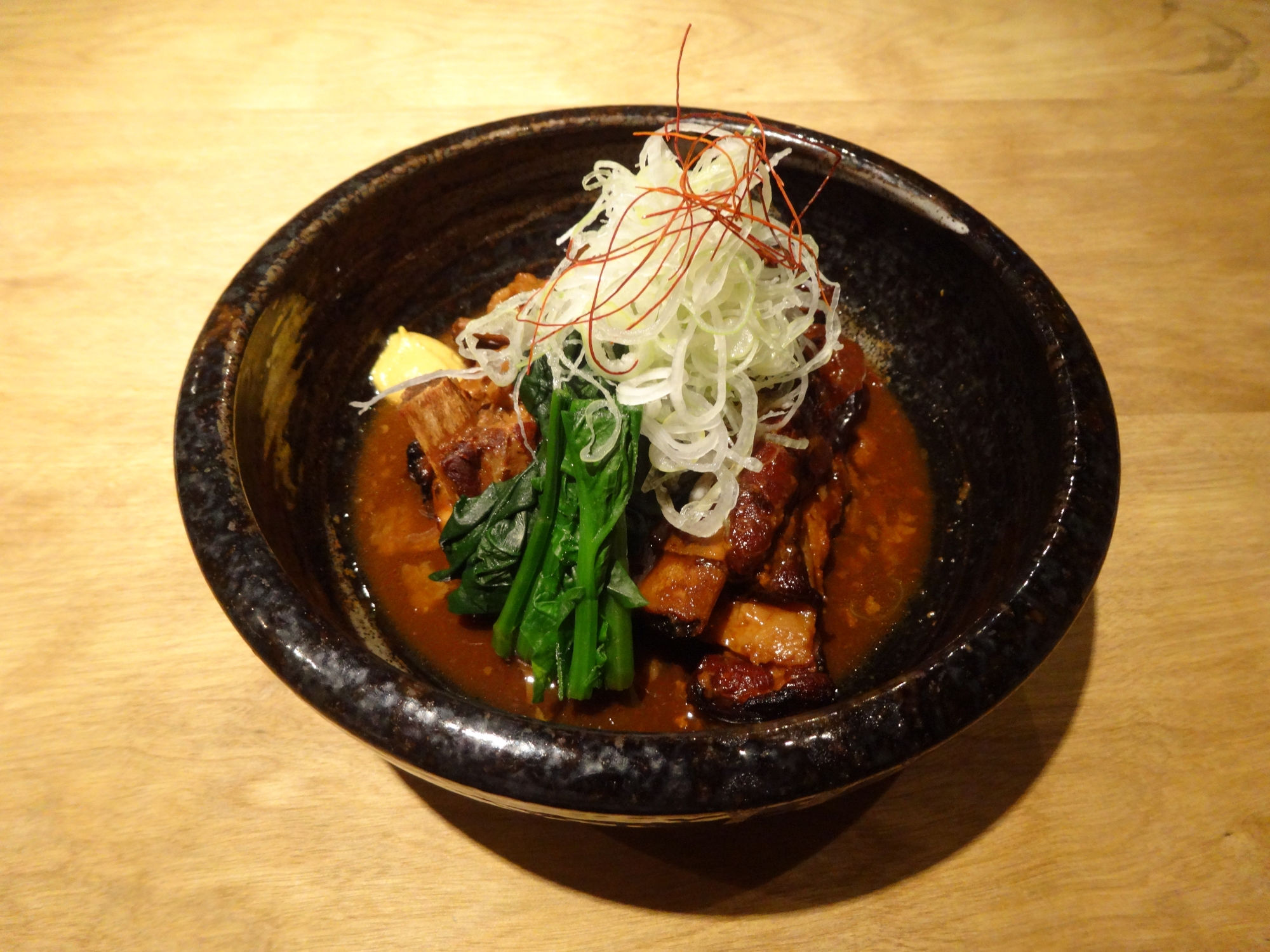 鹿児島黒豚のとんこつ（鹿児島県鹿児島市、食のオアシス Zinoより撮影）